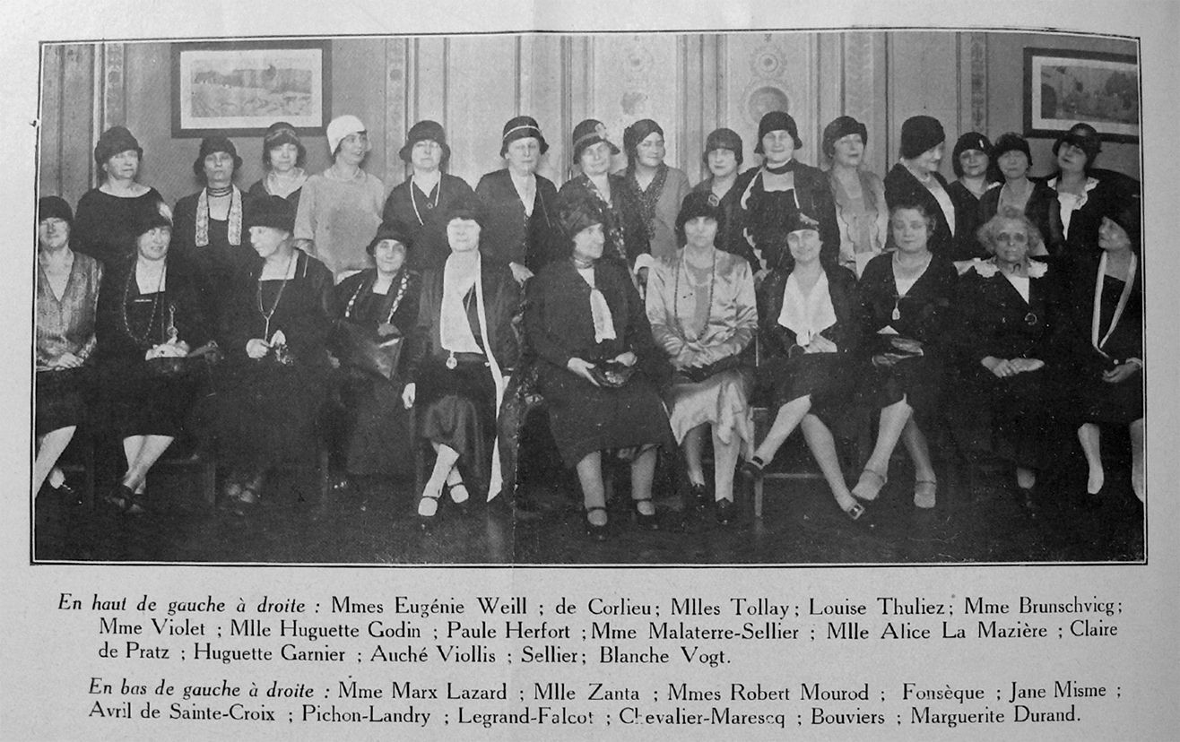 Photographie des déléguées aux Etats généraux du féminisme organisé par le Conseil national des femmes françaises à Paris en 1929